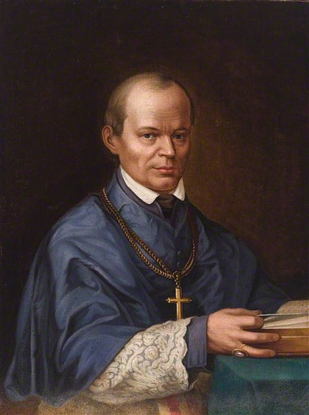 Biskup wileński Adam Stanisław Krasiński